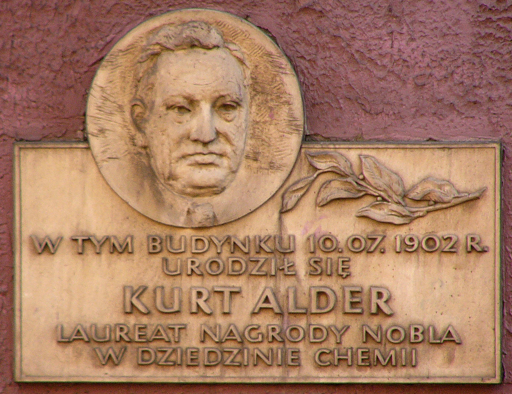 Gedenktafel für Kurt Alder in Königshütte / Królewska Huta / Chorzów in Oberschlesien